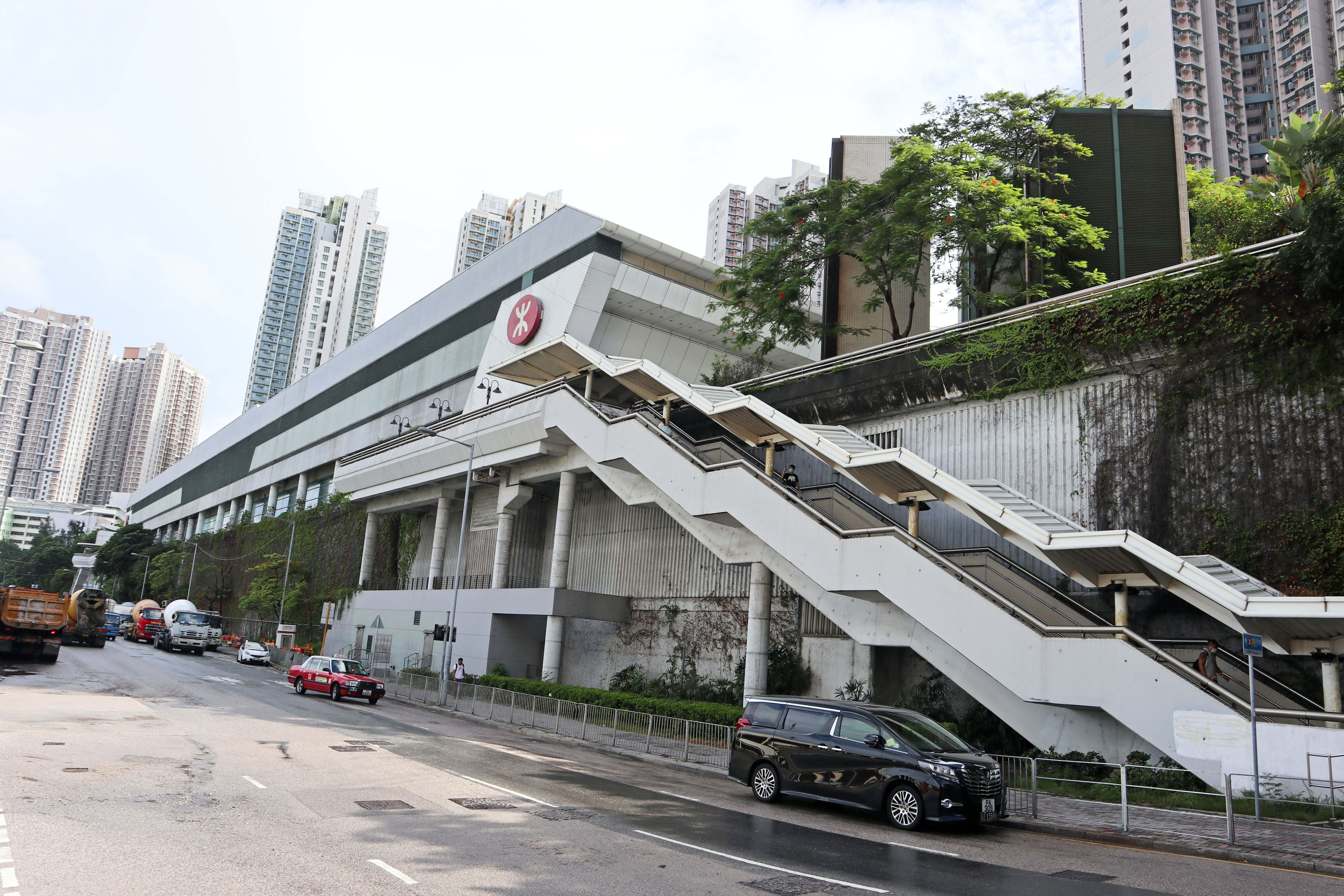 港鐵油塘站外觀